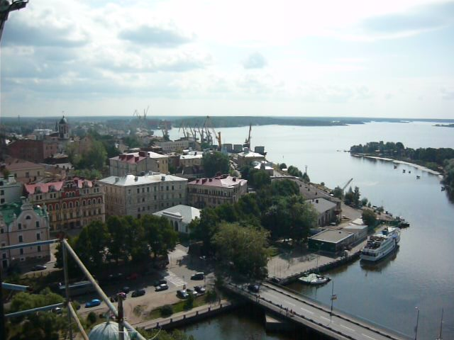 Baltské moře ve Vyborgu, Rusko